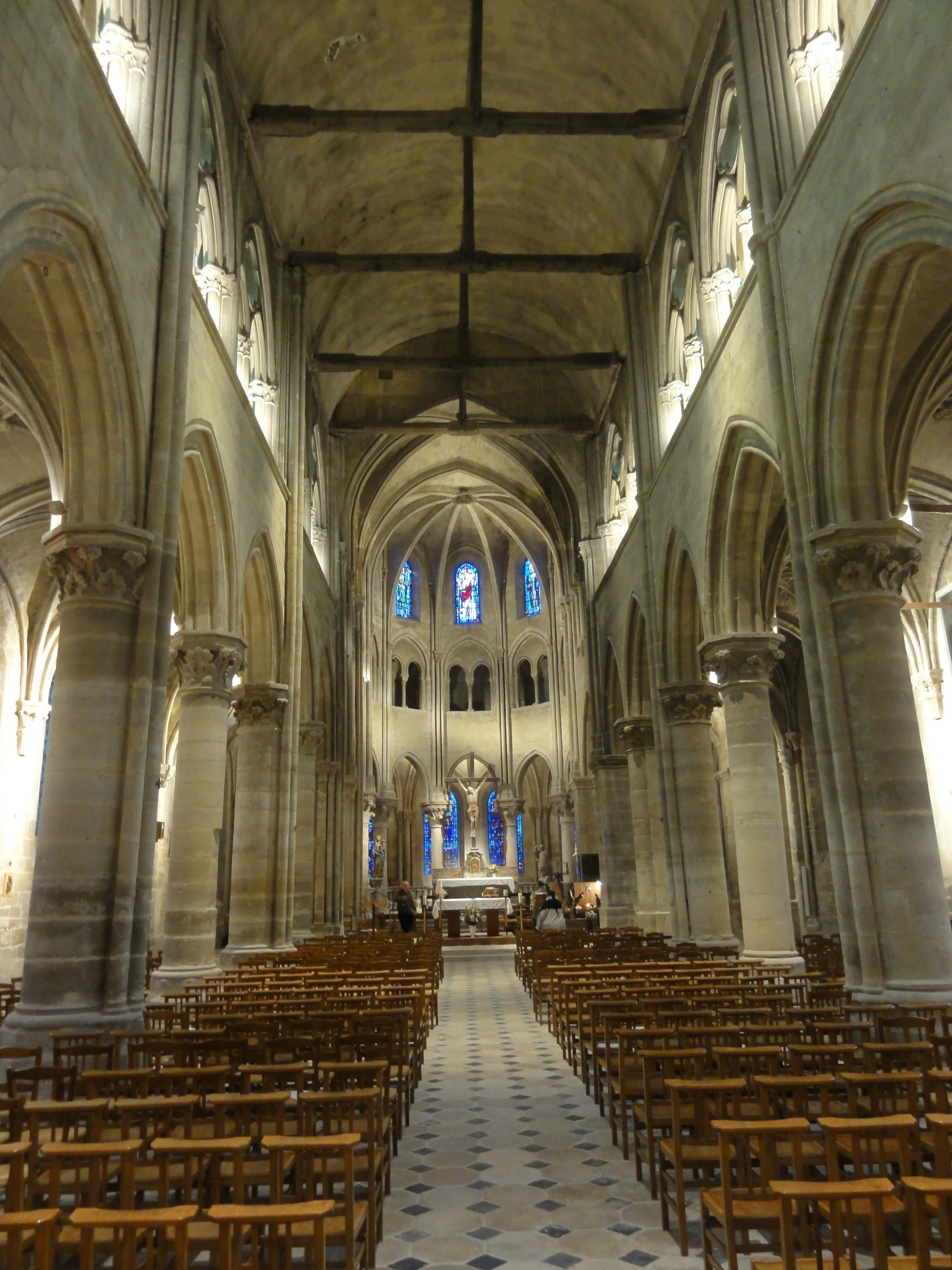 Nef, vue vers l'est.